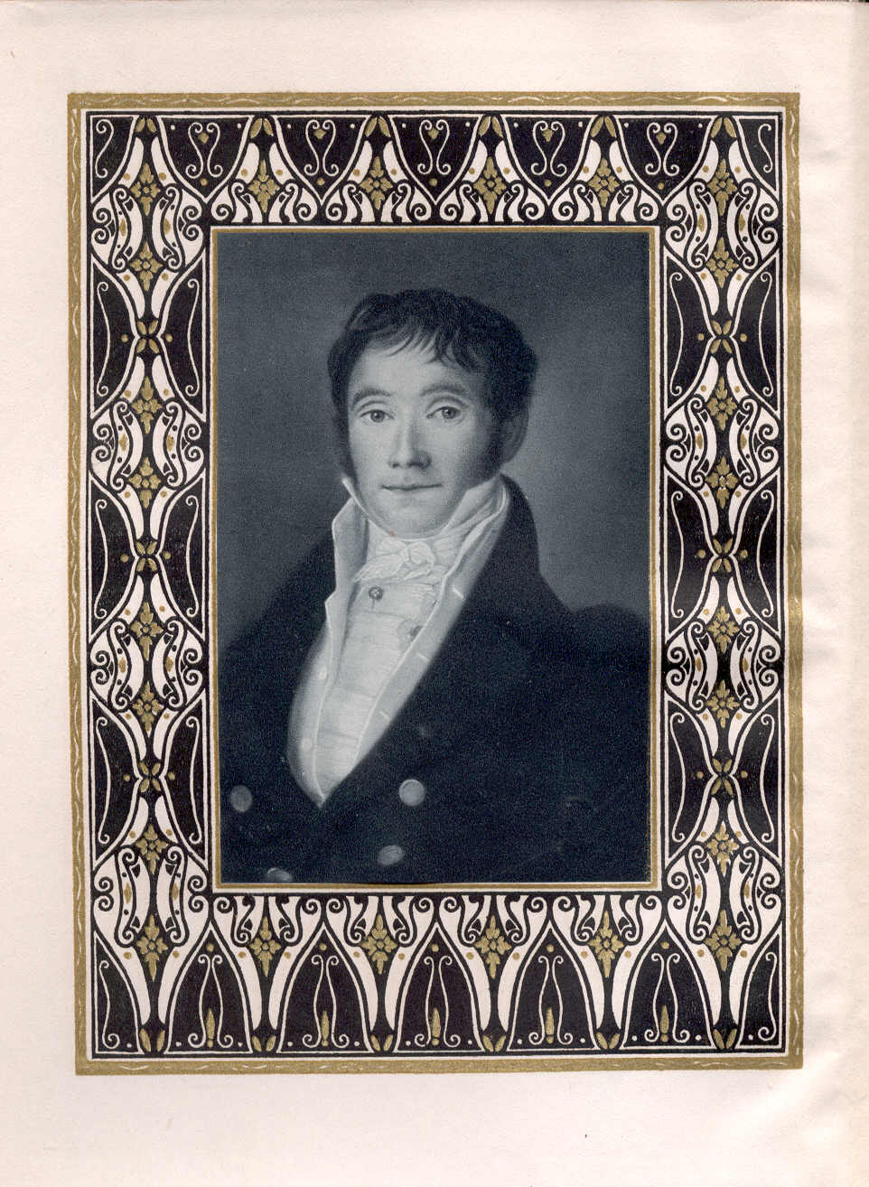 Benedictus Gotthelf Teubner (1784–1861), deutscher Verleger